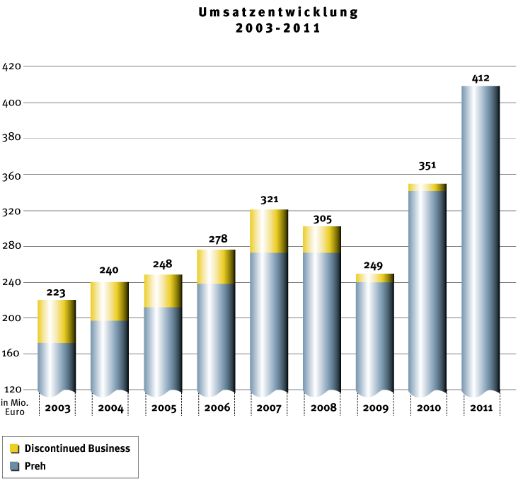 Umsatzentwicklung der Preh GmbH von 2003-2011